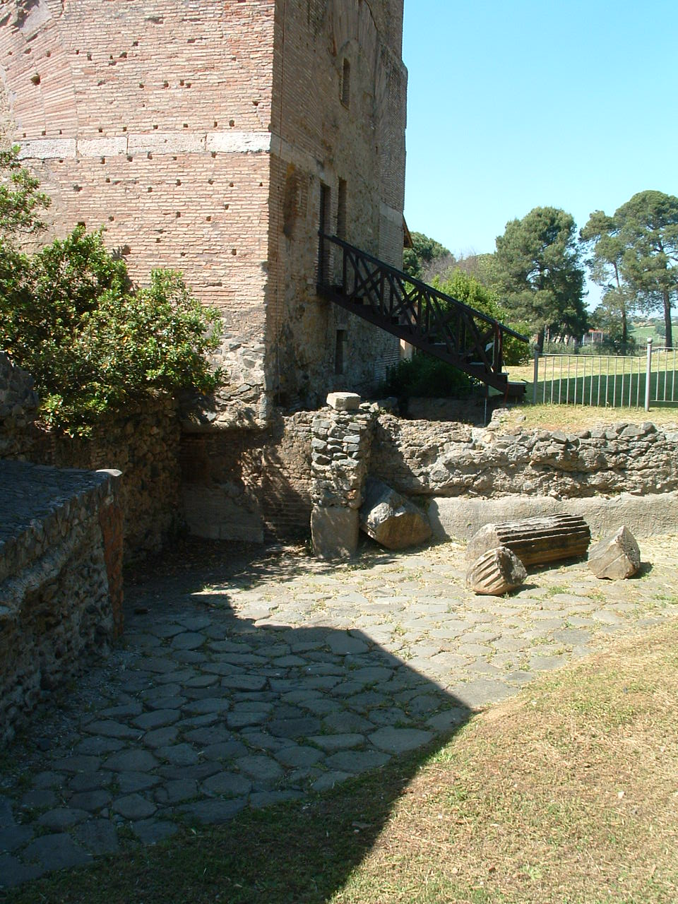 Resti antica via Flaminia presso arco di Malborghetto